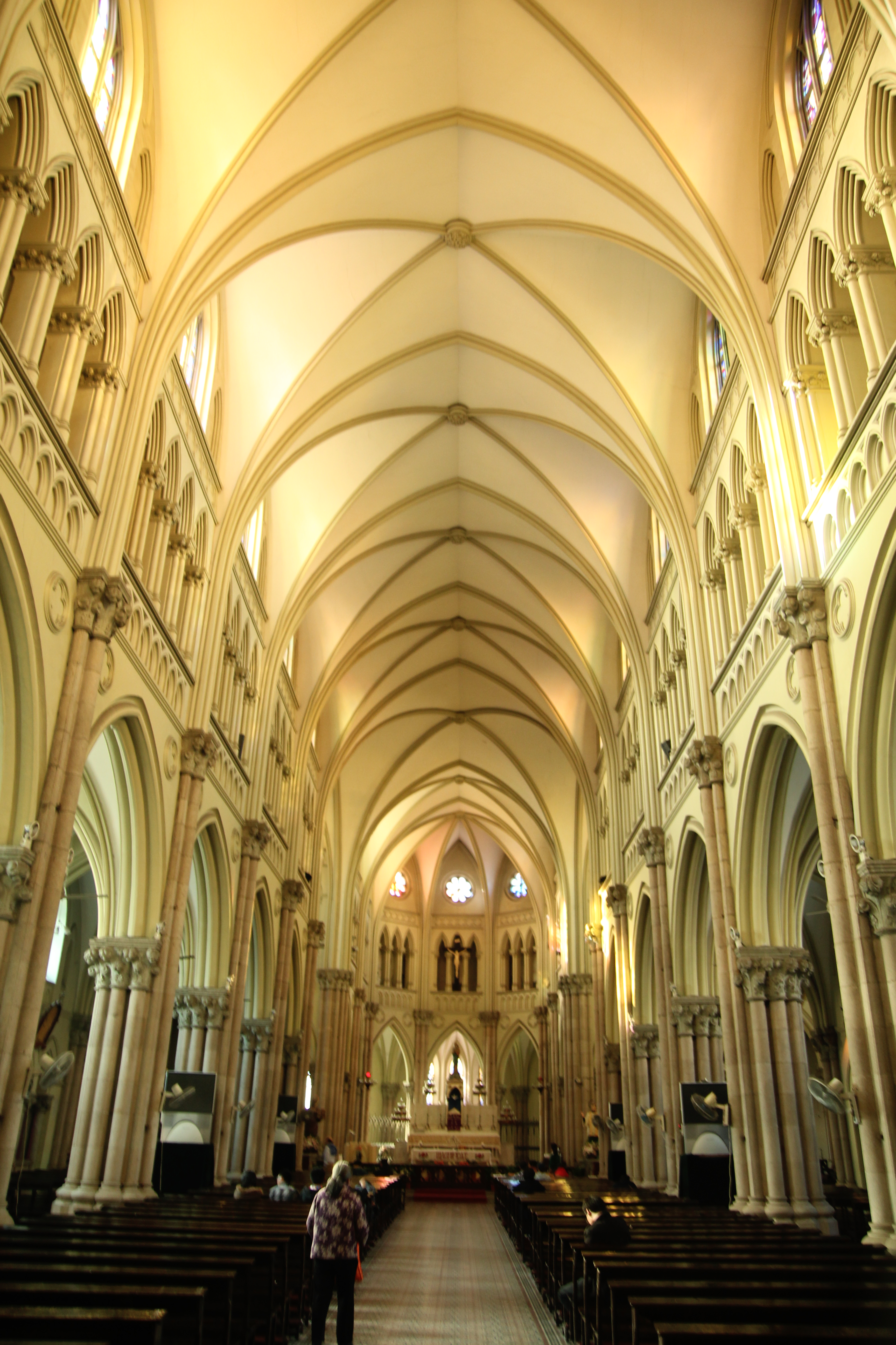 中文（中国大陆）: 徐家汇圣依纳爵主教座堂内景